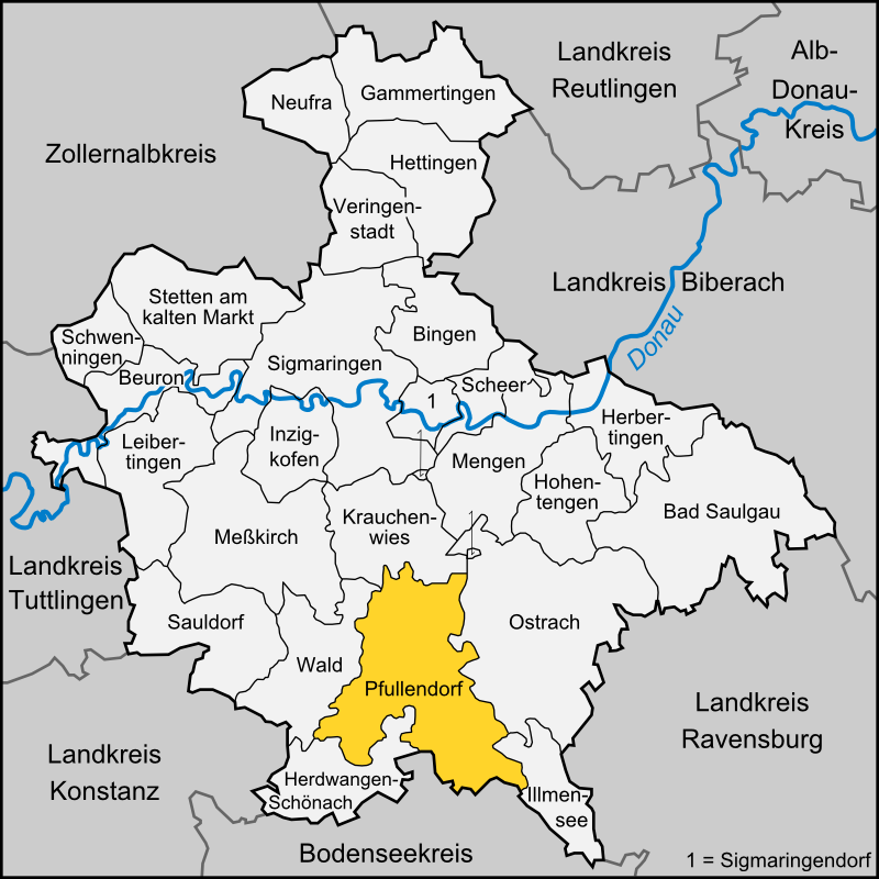 Karte der Stadt Pfullendorf im Landkreis Sigmaringen